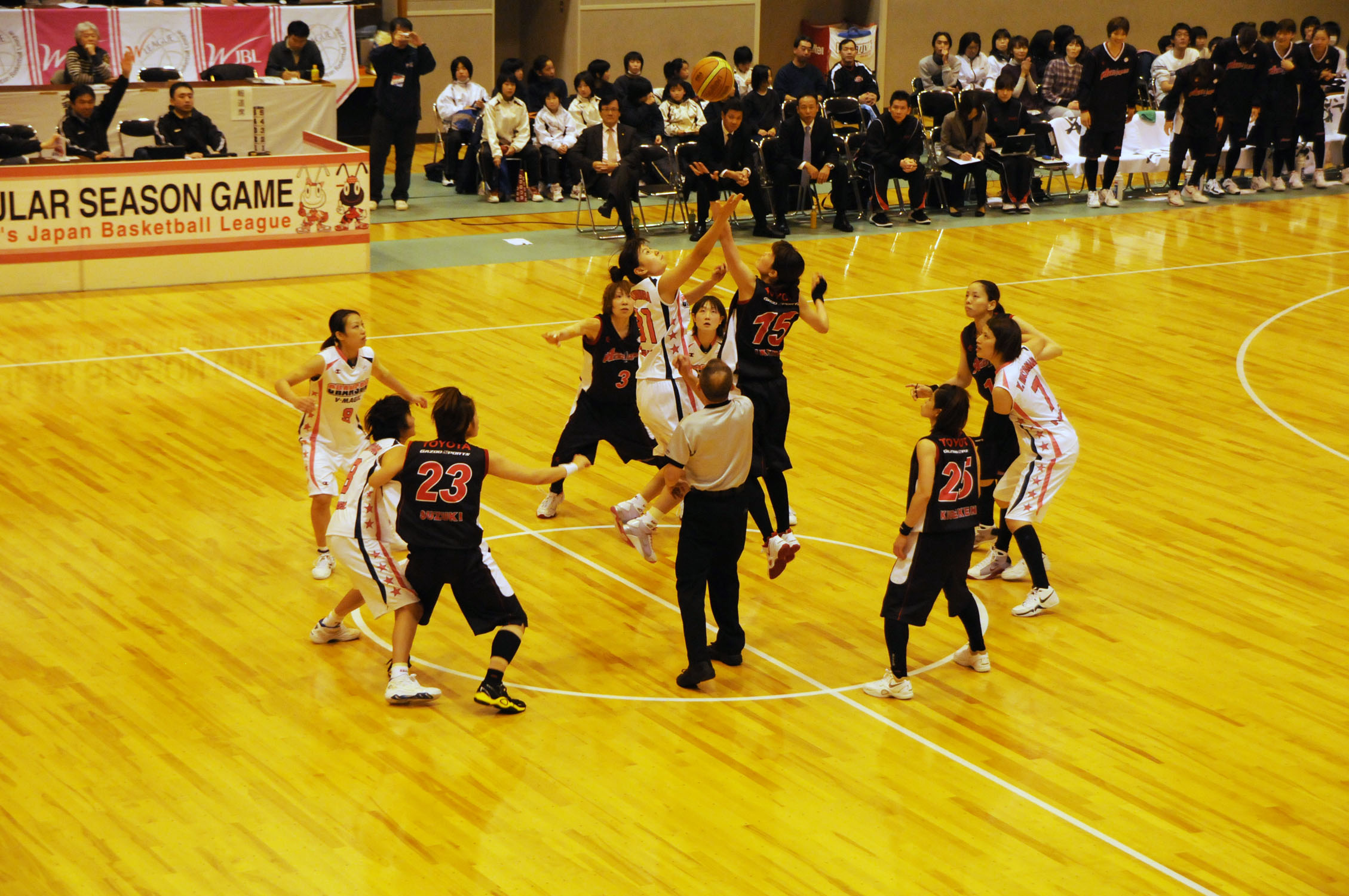 WJBL 10-11レギュラーリーグ、トヨタ対シャンソン。増田体育館で。